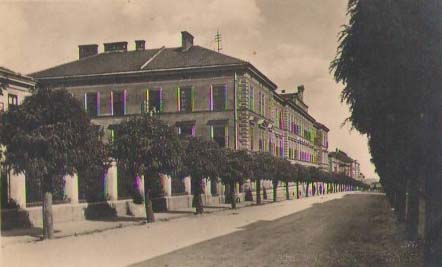 k.u.k. Kaserne in Znaim